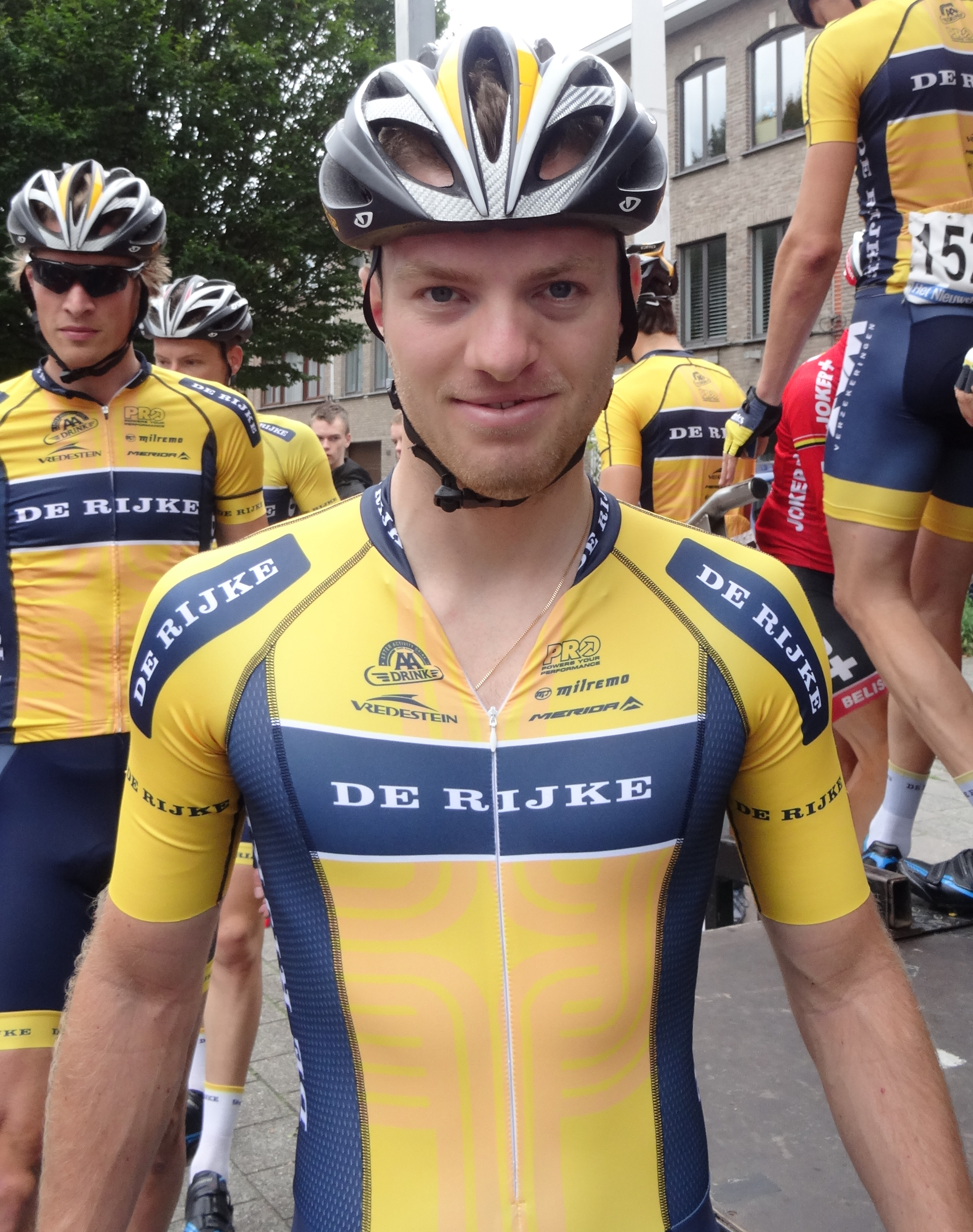 Reportage photographique réalisé le dimanche 10 août à l'occasion du départ et de l'arrivée de la Flèche du port d'Anvers 2014 à Merksem (Anvers), Belgique.